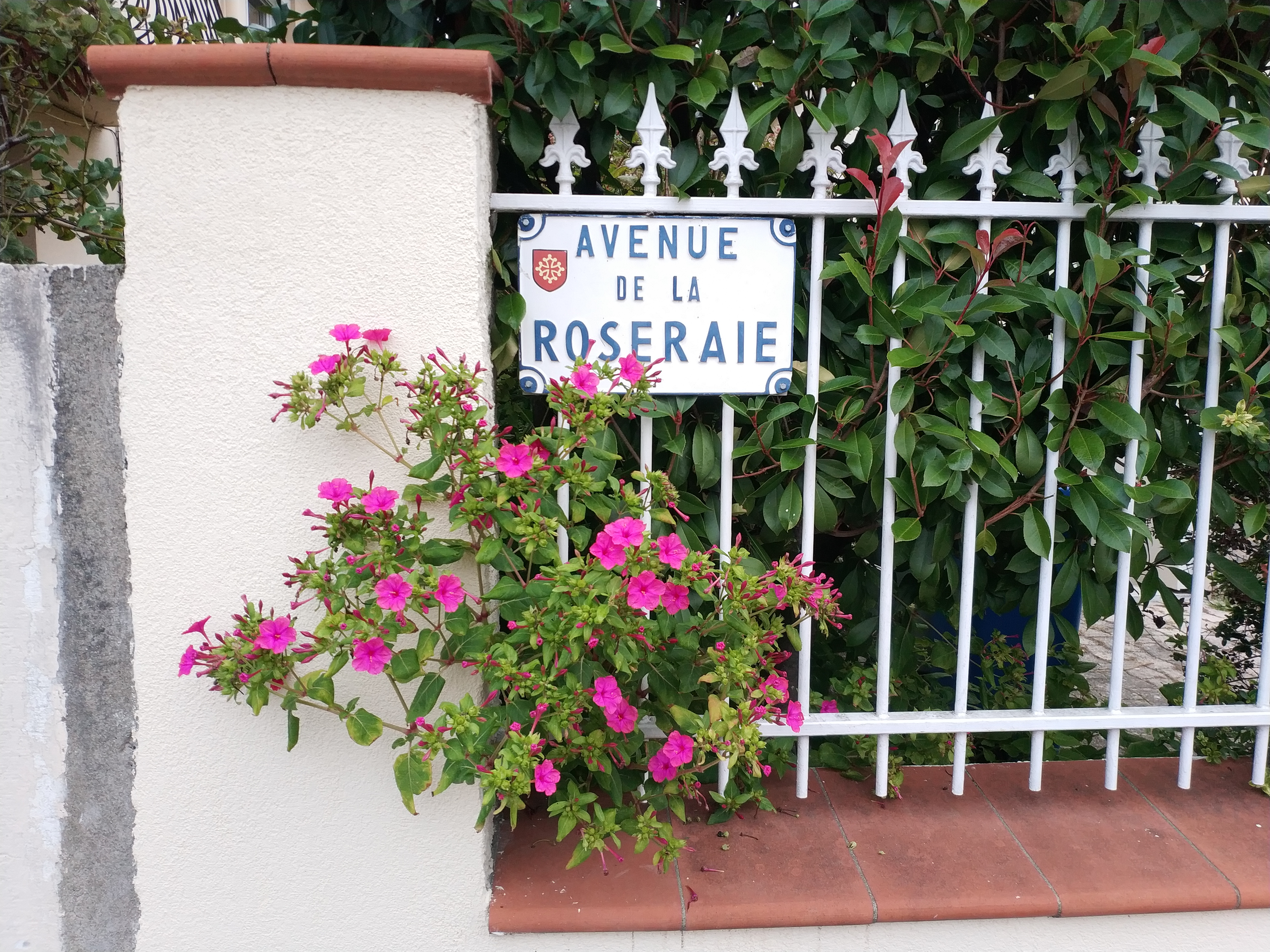 Plaque de rue sur l'Avenue de la Roseraie à Toulouse. Quartier bucolique.